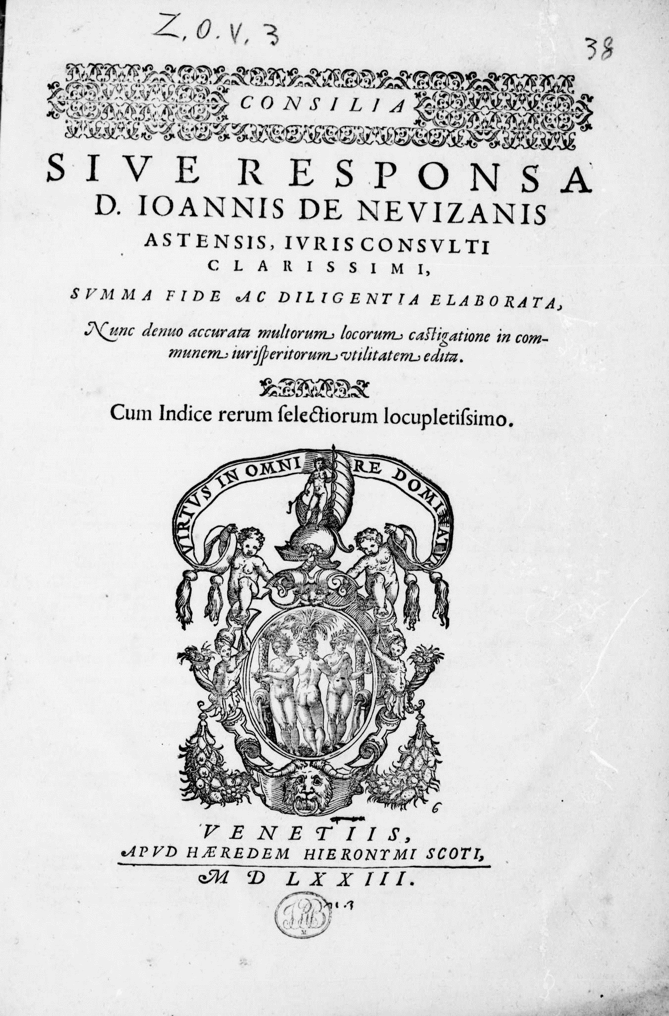 Frontespizio